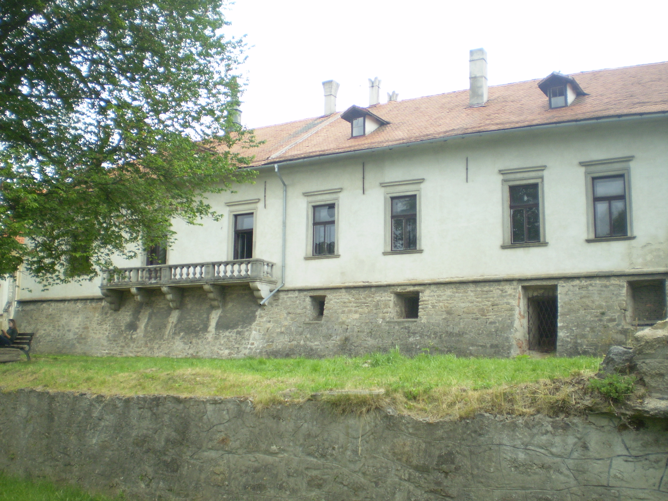 pohled z parku